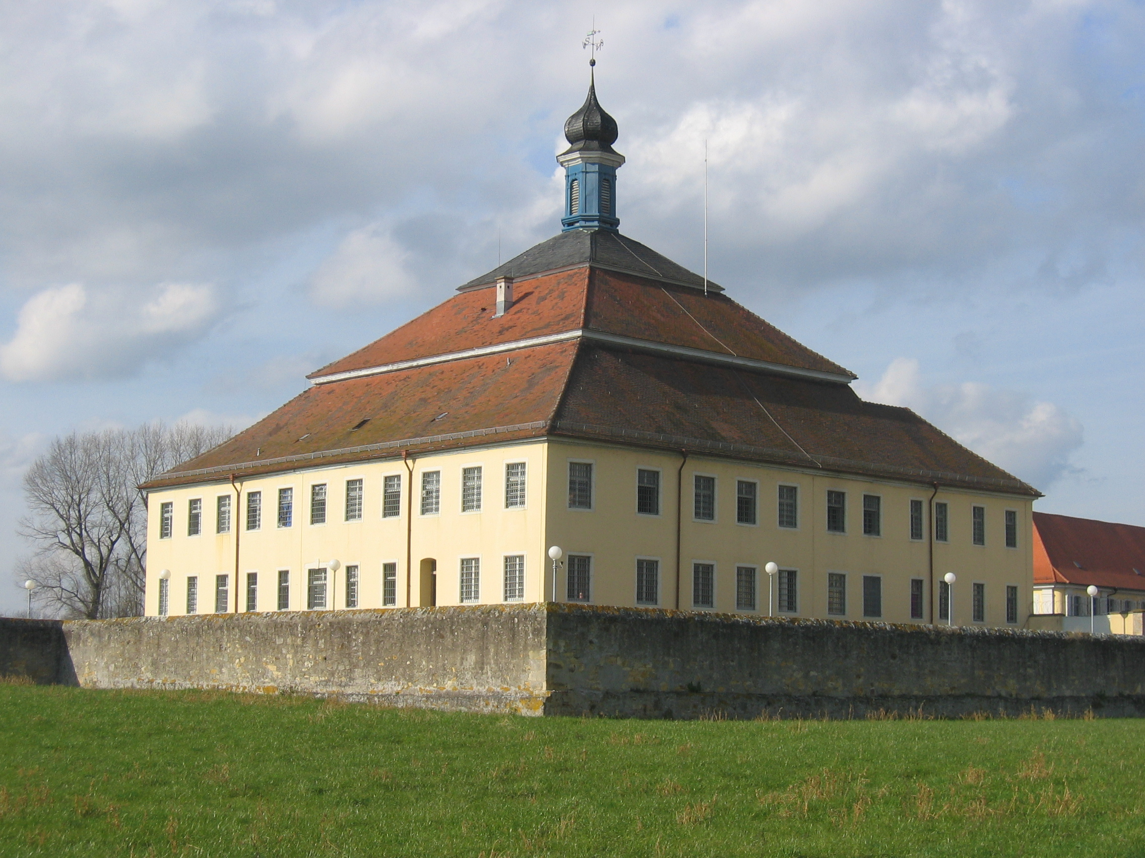 Schloss Kislau, Bad Mingolsheim, Deutschland